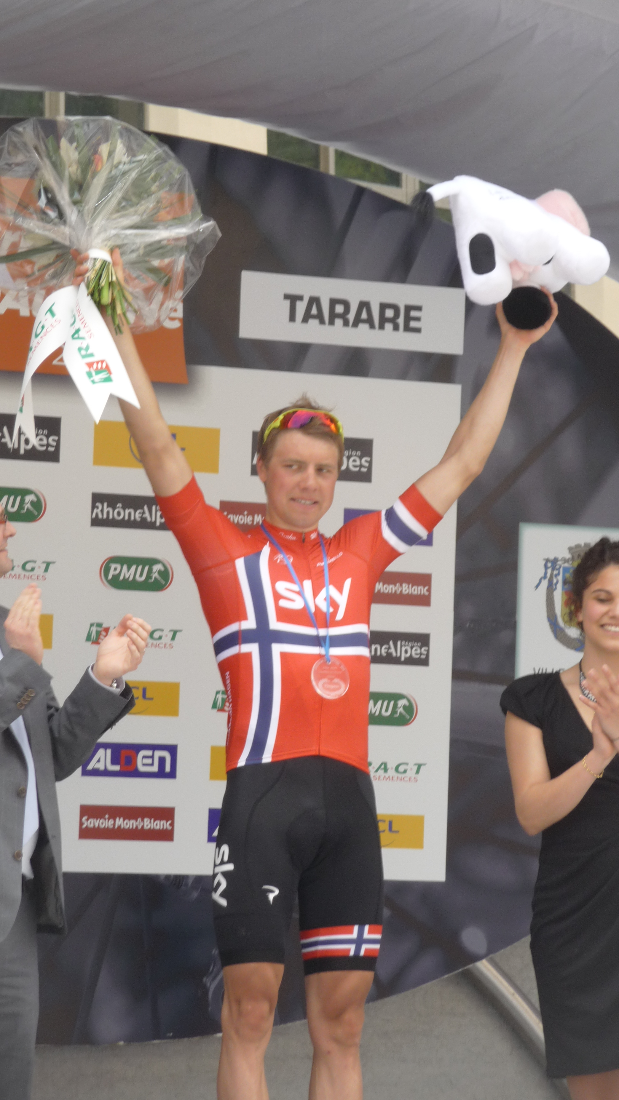 Arrivée de la 3e étape du Critérium du Dauphiné 2013 à Tarare le mardi 4 juin 2013. Podium de la 3e étape à Tarare, Edvald Boasson Hagen vainqueur de l'étape